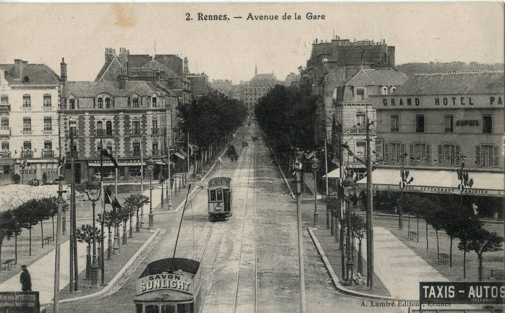 Carte postale ancienne éditée par A. Lamiré à Rennes :RENNES - Avenue de la Gare